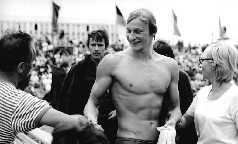 Roger Pyttel ADN-ZB Mittelstädt 14-7-73 Berlin: 24. DDR-Meisterschaften im Sportschwimmen-Der 16jährige Leipziger DHfK-Sportler Roger Pyttel ist bei den Herren der erfolgreichste Teilnehmer der diesjährigen Titelkämpfe. Bis zum vorletzten Wettkampftag konnte er bereits mit seinen Einzelsiegen über 100 m, 200 m und 400 m Freistil sowie über 200 m Lagen vier Goldmedaillen erkämpfen. Bis auf die 200 m Freistil stellte er in den anderen drei Wettbewerben neue DDR-Rekord auf.